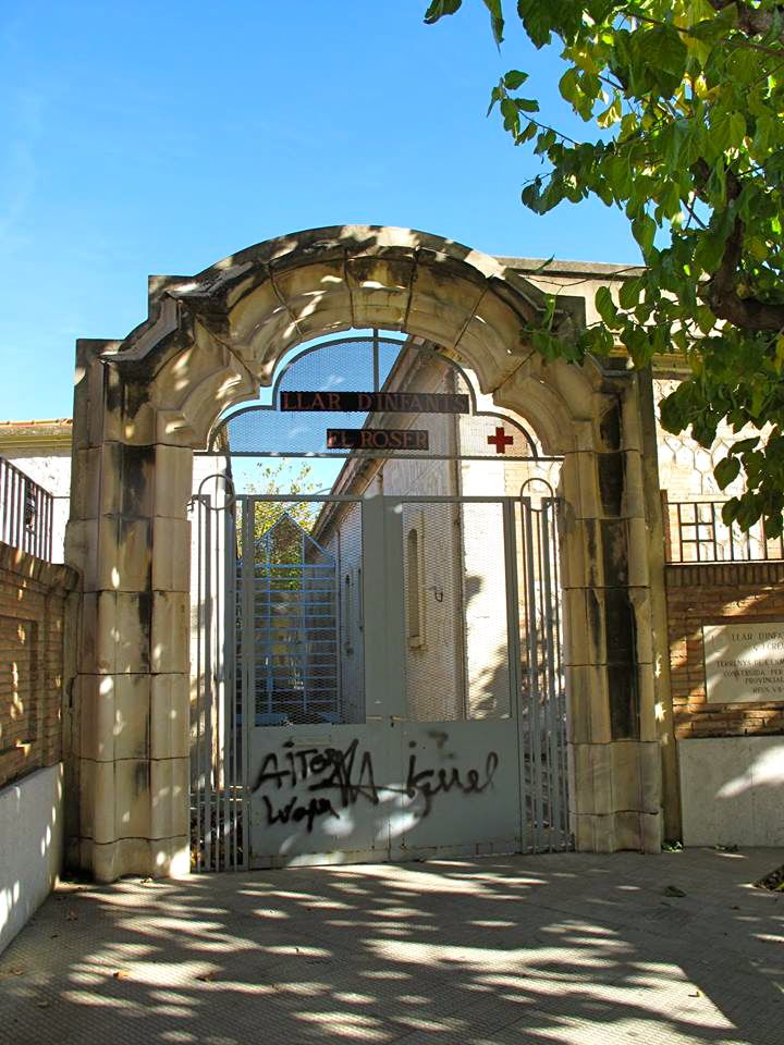 Portal del Palau Miró, reaprofitat com a porta d'entrada d'una guarderia, a Reus